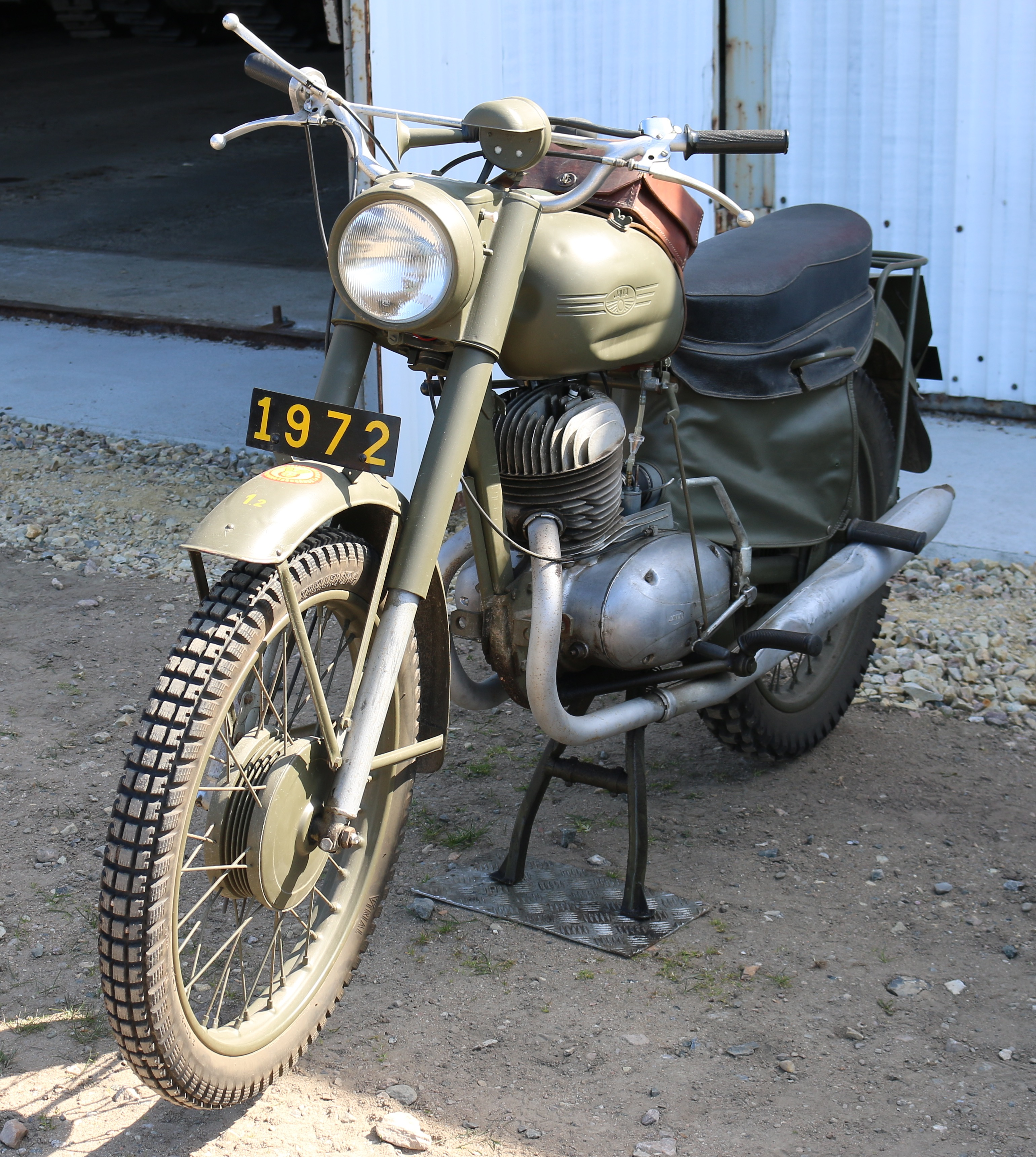 Jawa motorcykel Artillerimuseet 2017